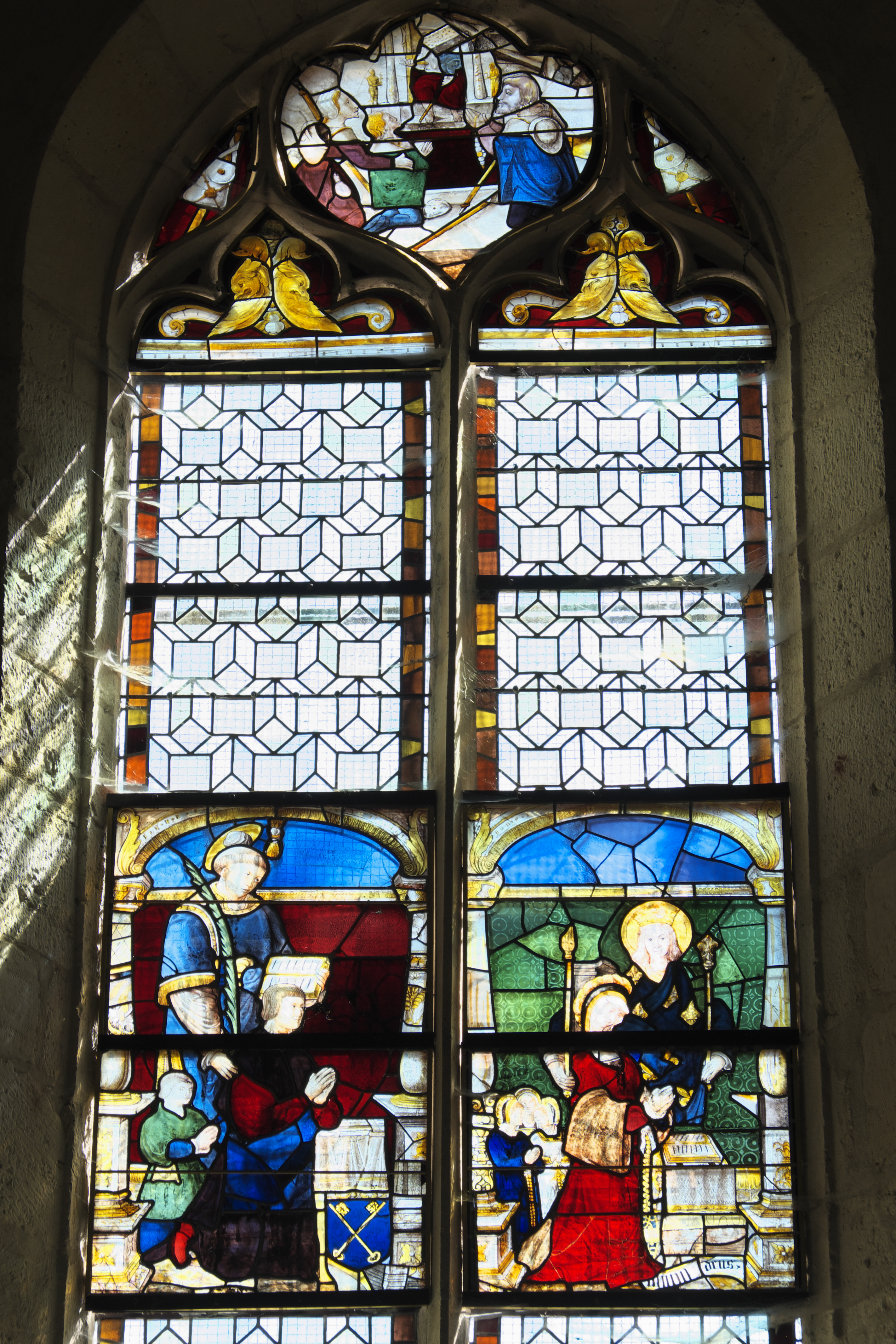 Kirche Sainte-Osmanne in Féricy im Département Seine-et-Marne (Île-de-France/Frankreich), Bleiglasfenster Nr. 4, zwischen 1532 und 1540 geschaffen; Darstellung: Stifter